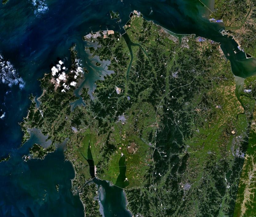 태안반도. Taean Peninsula